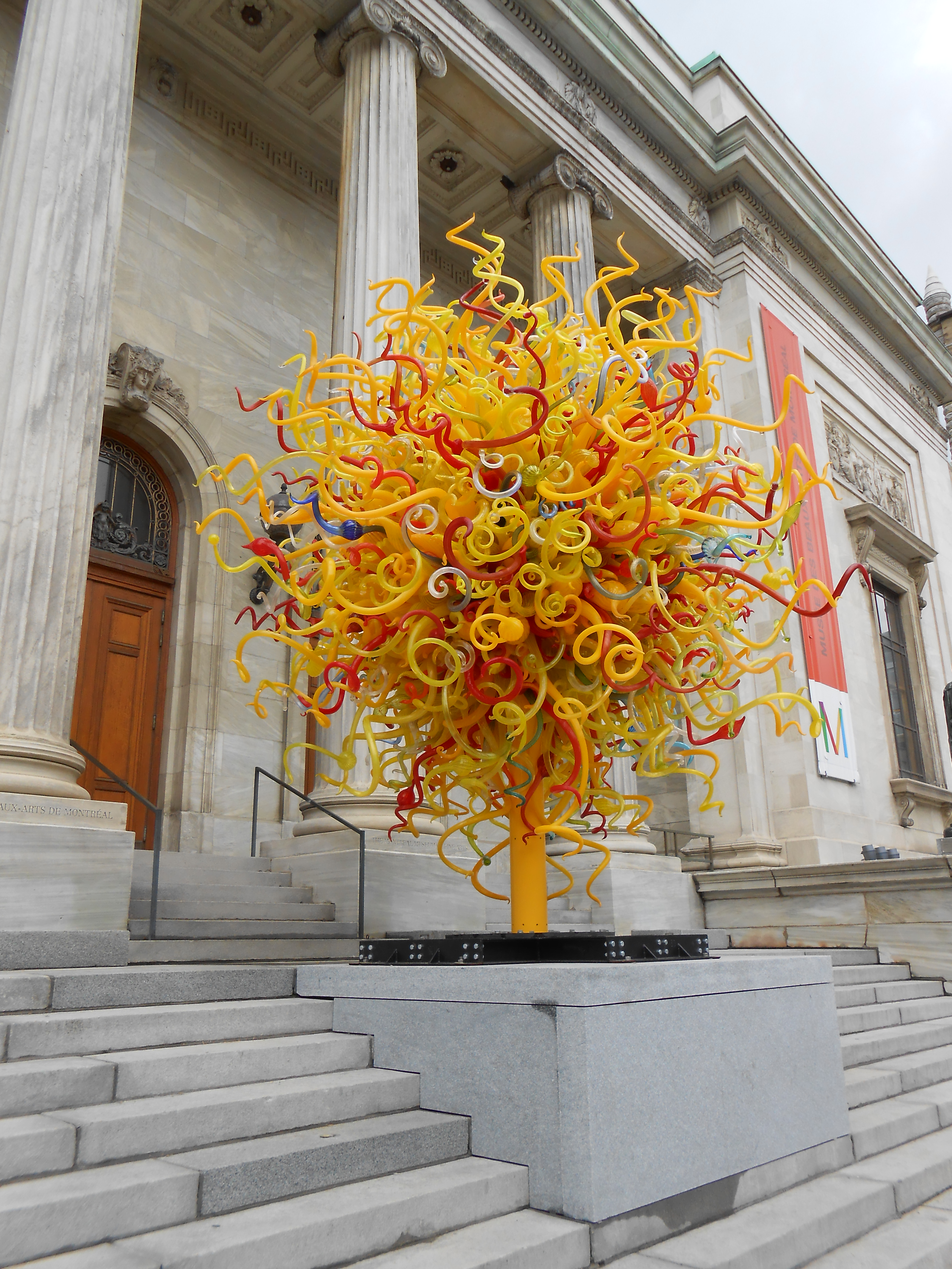 Musée des beaux-arts de Montréal : Chihuly, un univers à couper le souffle